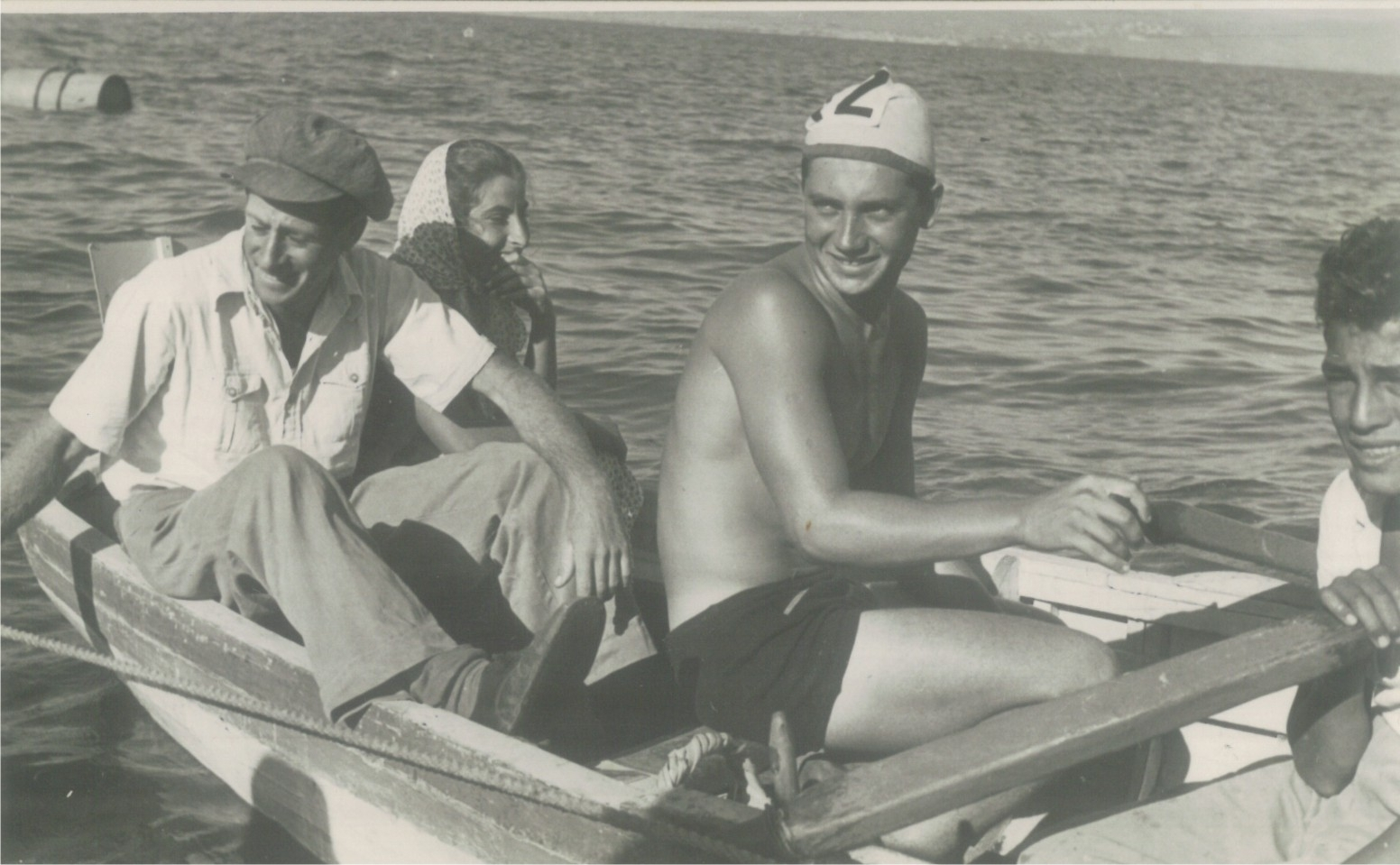 בכנרת, לקראת עוד צליחה תחרותית